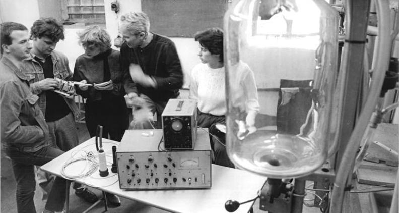 Leipzig, Universität, Studenten ADN-ZB Grubitzsch 30.4.87 Bez. Leipzig: Jugend-Praxisbezogen ist die Ausbildung der Studenten der Sektion Tierproduktion-Veterinärmedizin an der Karl-Marx-Universität Leipzig. Im Auftrag des VEB Anlagenbau Impulsa Elsterwerda führen die Studenten u.a. Forschungsarbeiten für Melkanlagen durch. Dr. Helmut Lohr, wissenschaftlicher Oberassistent am Wissenschaftsbereich Maschinentechnik der Sektion, arbeitet mit künftigen Tierproduzenten und Veterinärmedizinern an einem Meßplatz zur Kontrolle von Melkanlagen.